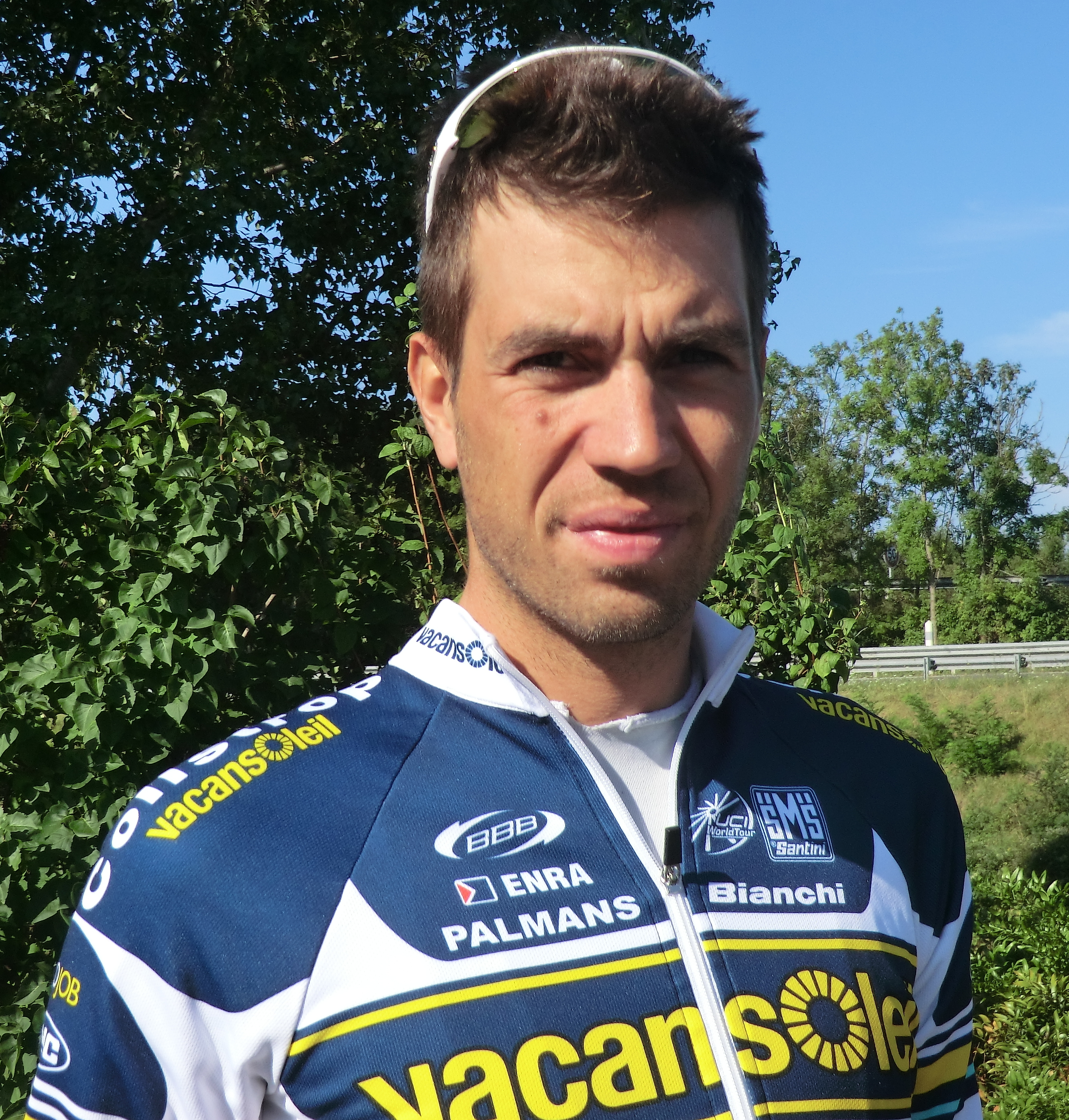 Coureurs à l'échauffement au matin du prologue du tour de l'Ain 2013, à l'hôtel Lyon-Est à Saint-Maurice-de-Beynost.